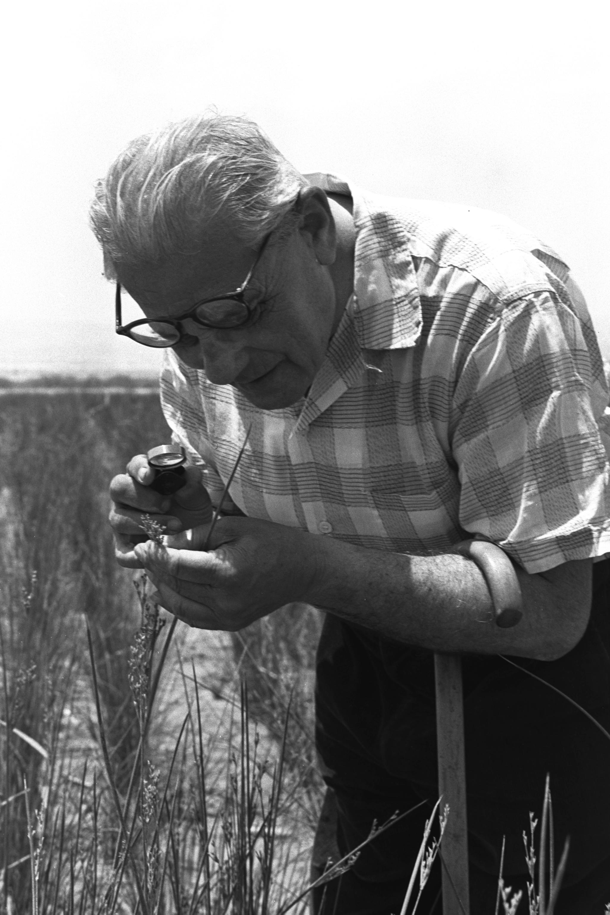 Dr. Hugo Boyko examines Juncus Buds on his pilot plantation near Sdom. דוקטור הוגו בויקו בוחן ניצנים שגדלו בפיילוט ניסויי ליד סדום Photo: FRITZ COHEN, 05/01/1963